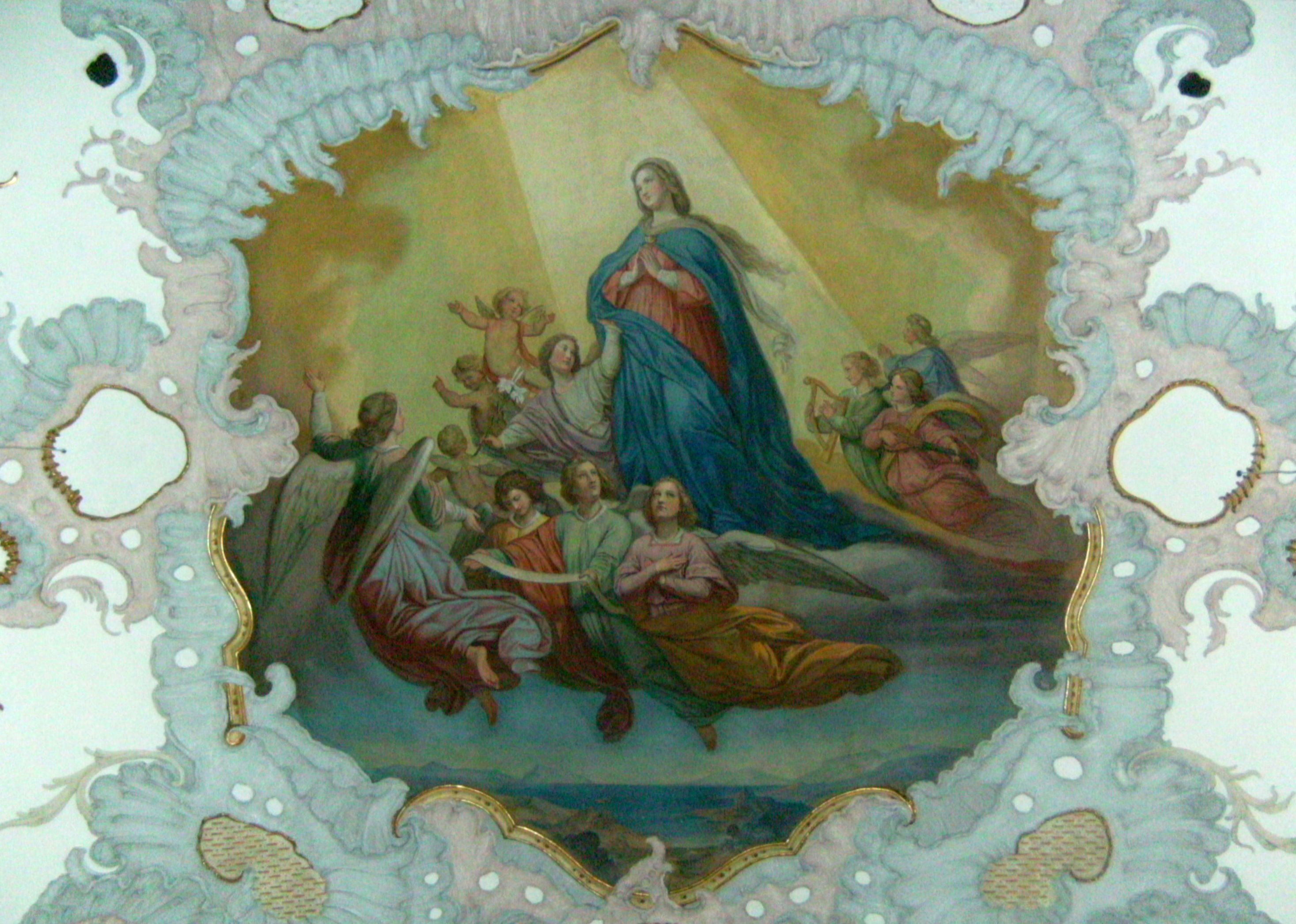 Deckenfresko St. Martin Heimertingen